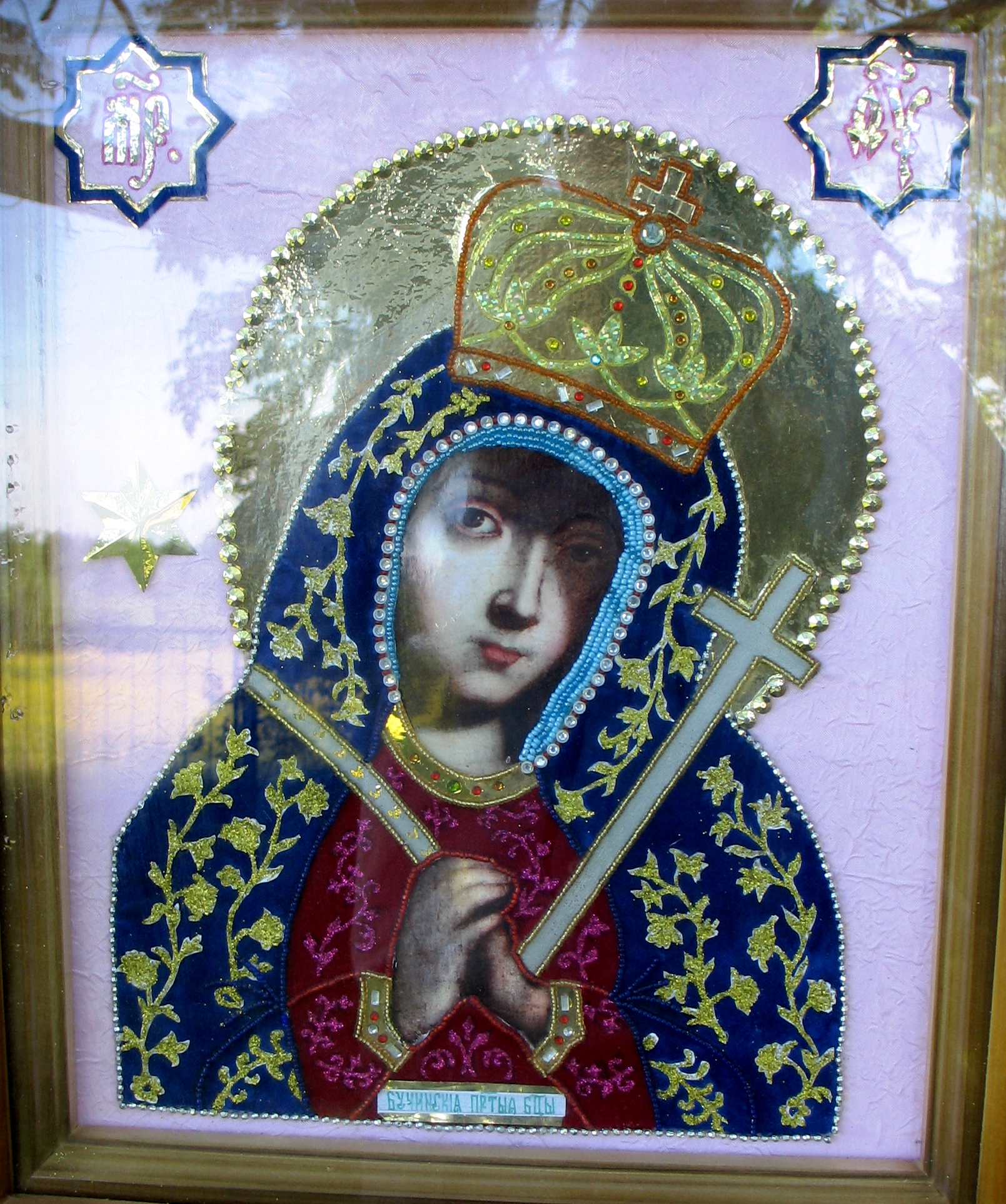 Список з Бучинської Ікони виготовлений прочанами з Пінська